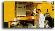 סלקטורים. התמונה באדיבות Putzmeister . את האישור ניתן למצוא כאן.